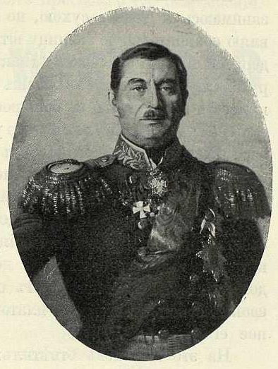 Нюландский губернатор Норденстам, Иван Иванович